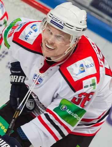 Защитник донецкого «Донбасса» Сергей Перетягин во время матча чемпионата КХЛ против хабаровского «Амура» 30 января 2013 года.